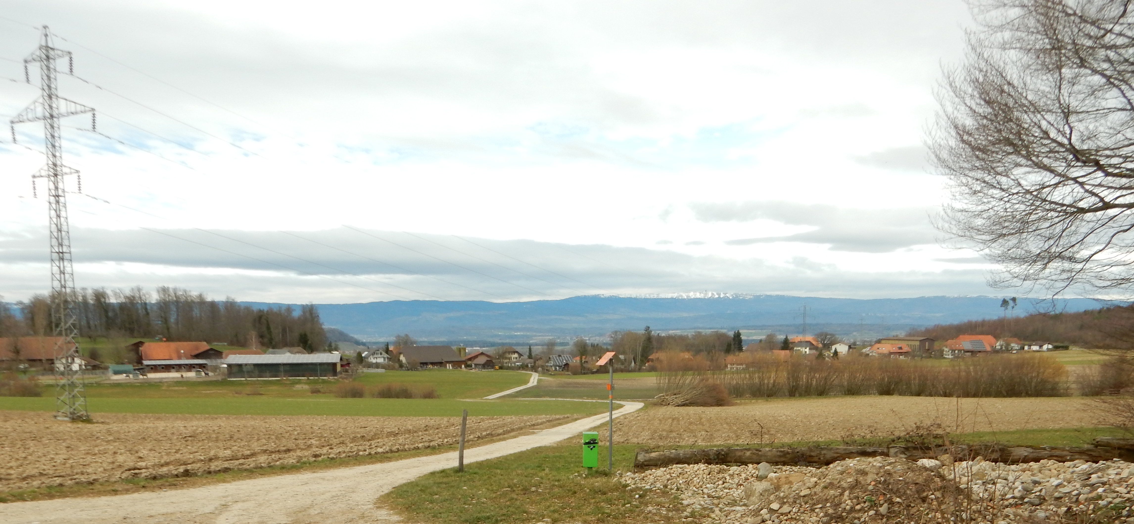 Altavilla FR, ehemalige Gemeinde im Kanton Freiburg, Schweiz